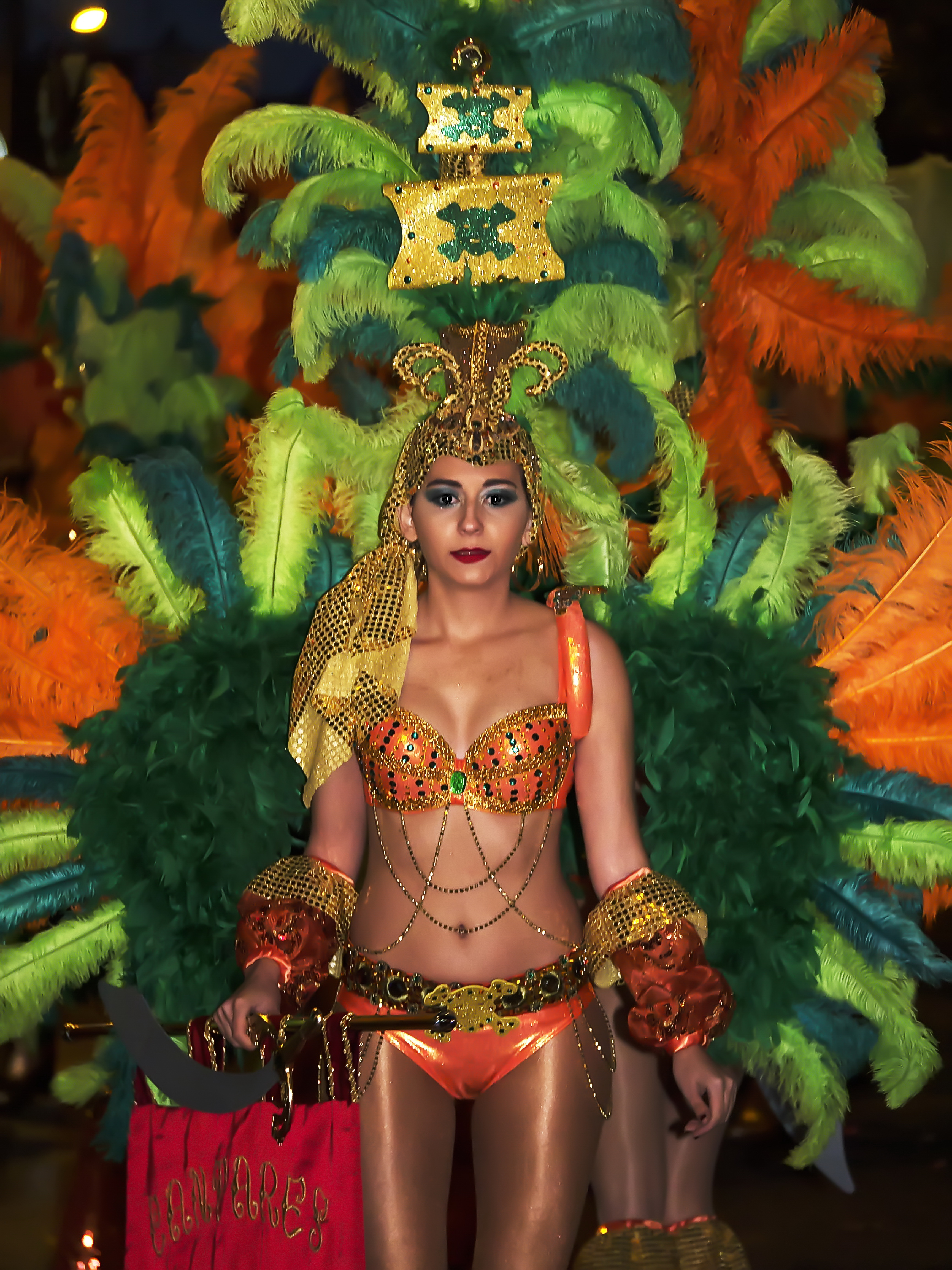 Carnaval de Cartagena (Murcia, España) - 06/02/2016 - P1270740